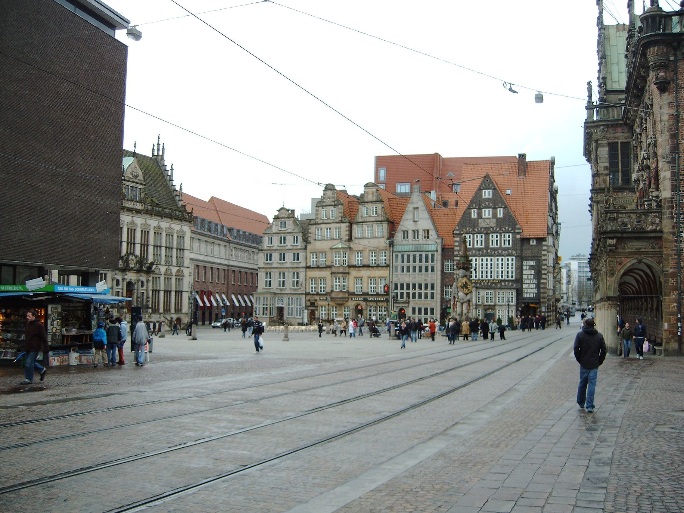 Náměstí v historické části Bremenu v Německu